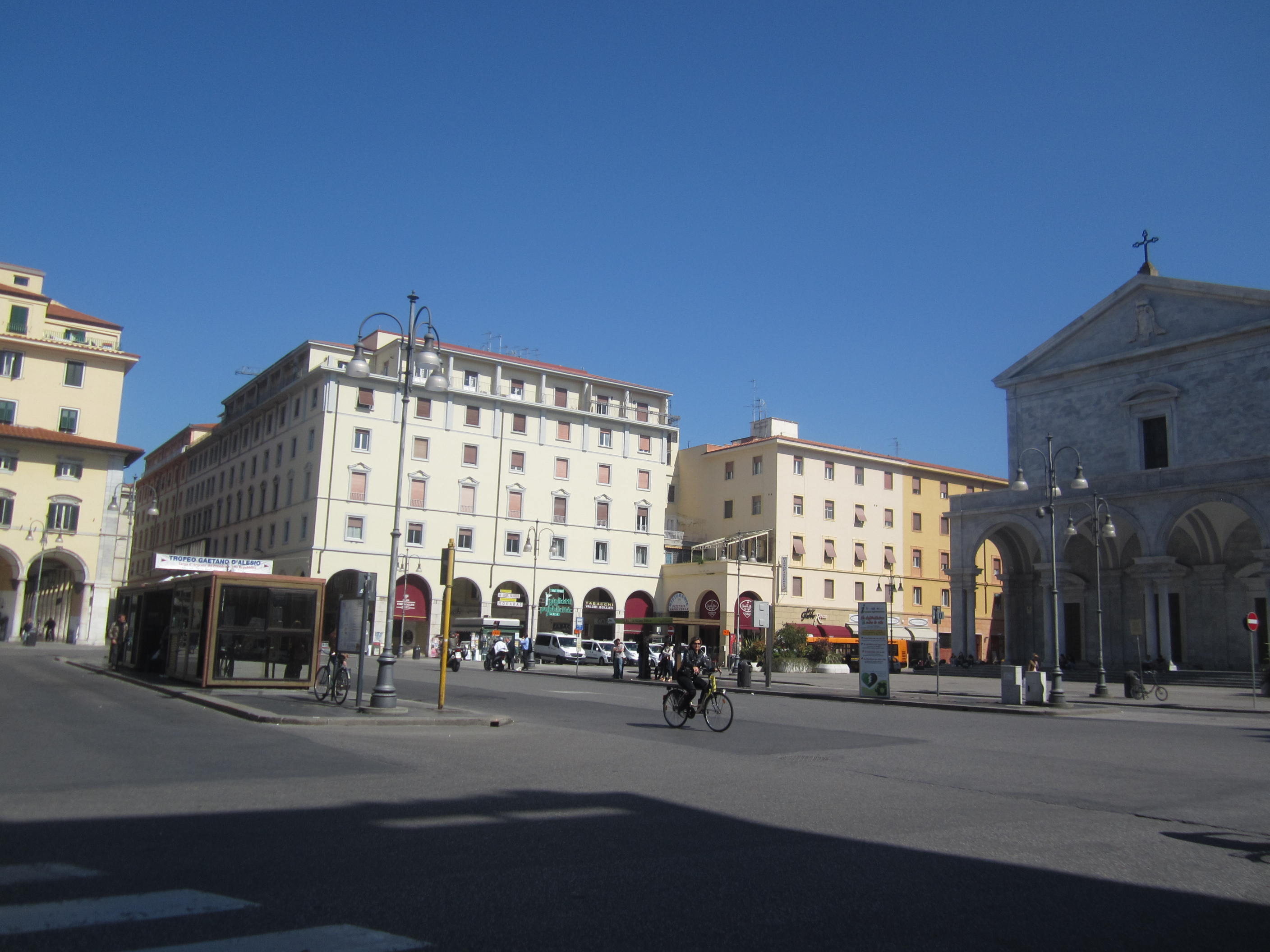 Piazza Grande a Livorno